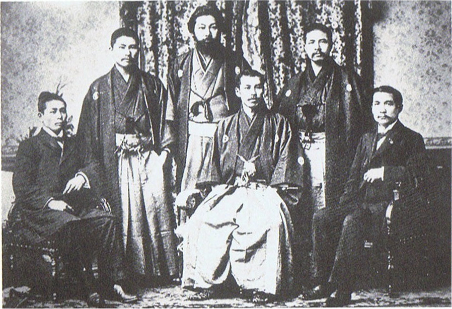 1897年、孫文と日本の九州の同志。前列右端が孫文、中央が小山雄太郎、左端が末永節。後列右端が清藤幸七郎、中央が宮崎滔天、左端が内田良平。